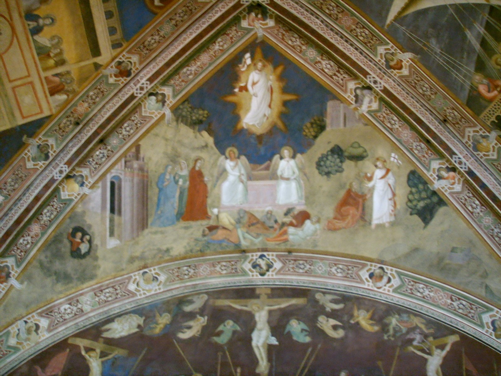 Santa Maria Novella church, Cappellone degli Spagnoli (Big Chapel of Spanish), fresco by Andrea di Bonaiuto, in Florence, Italy